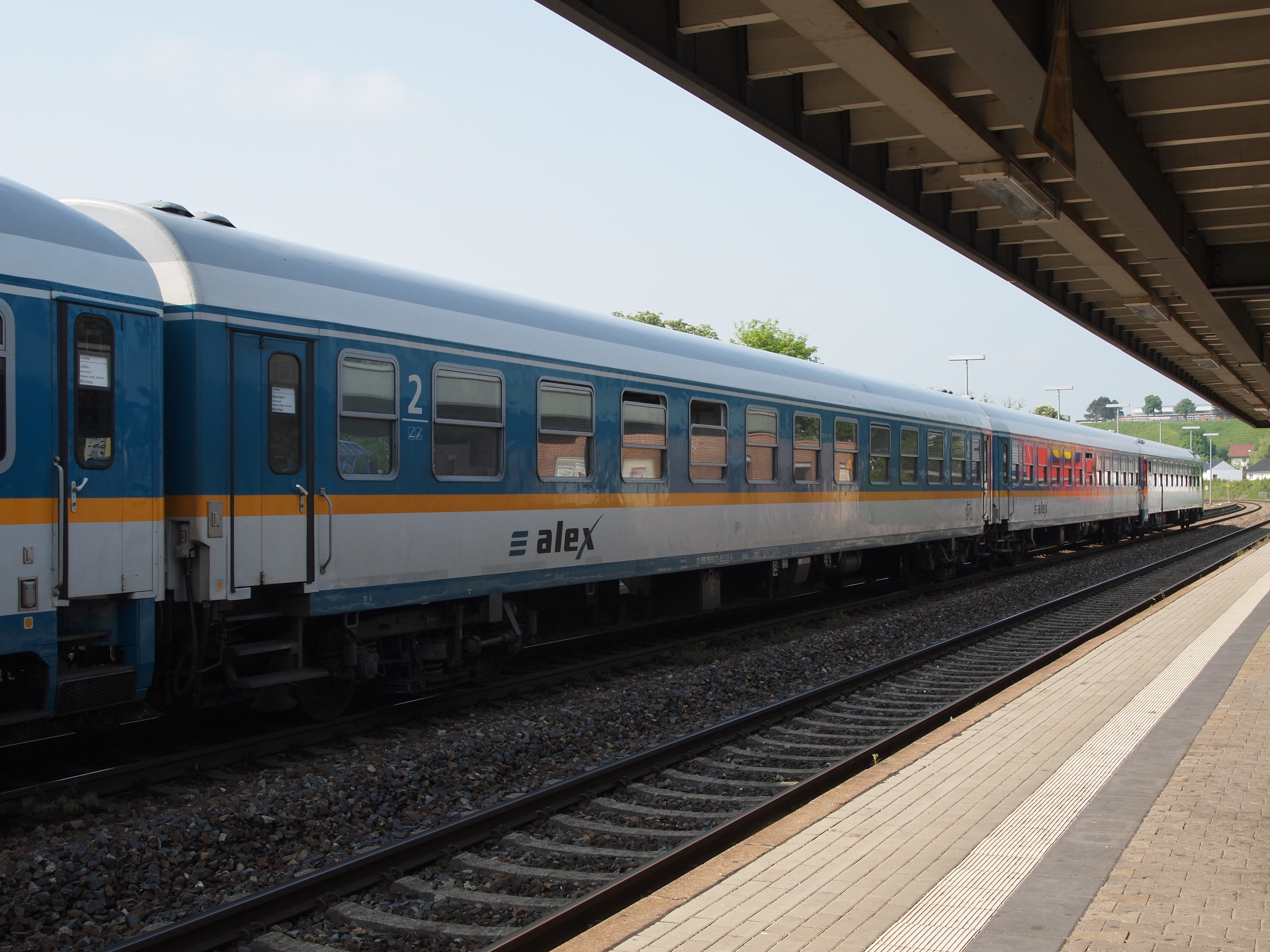 alex am Bahnhof Kaufbeuren, Stopp vor Weiterfahrt nach Kempten/A.